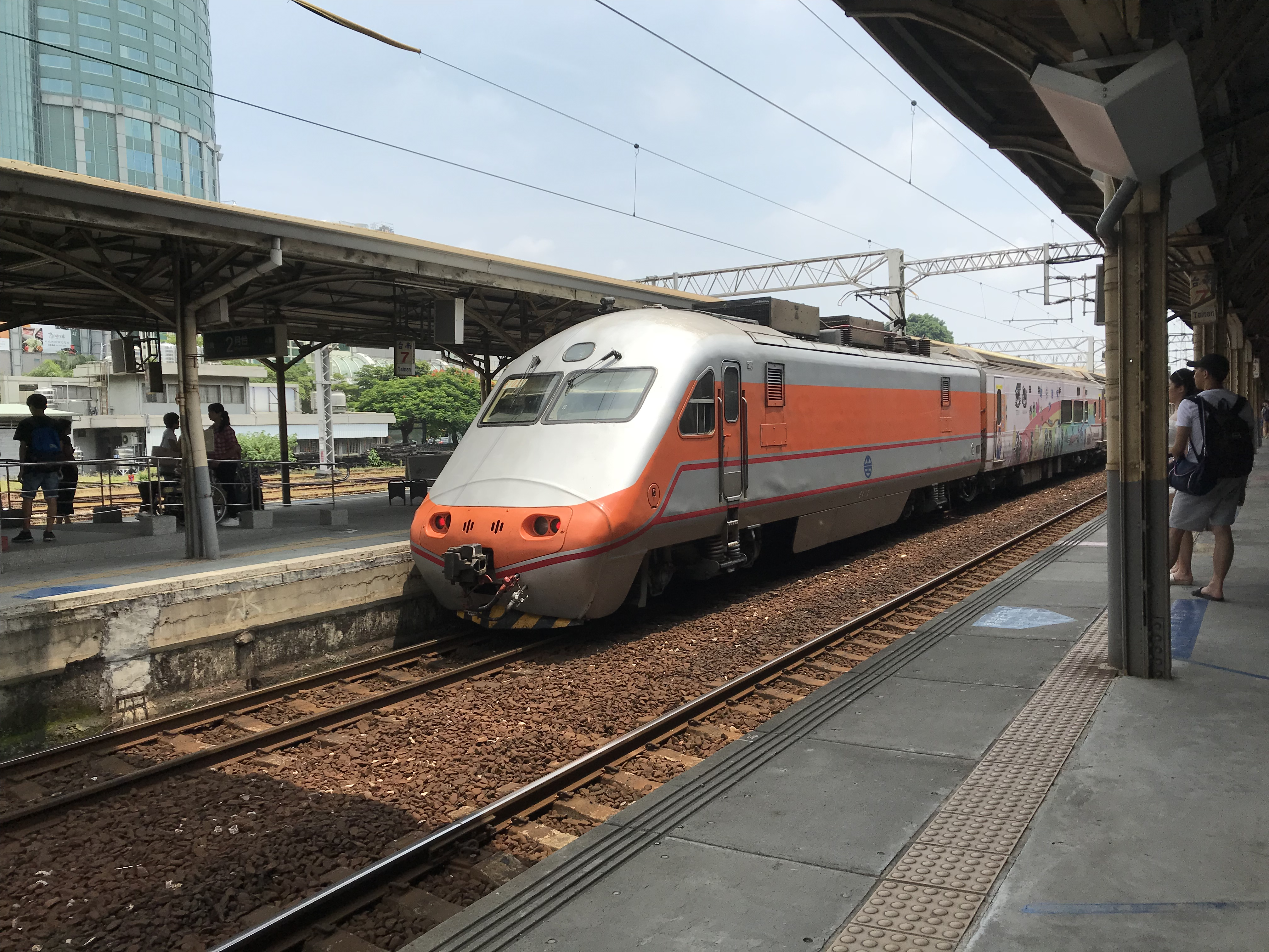 在台南車站拍攝的台鐵E1000型電力機車（編號E1022）